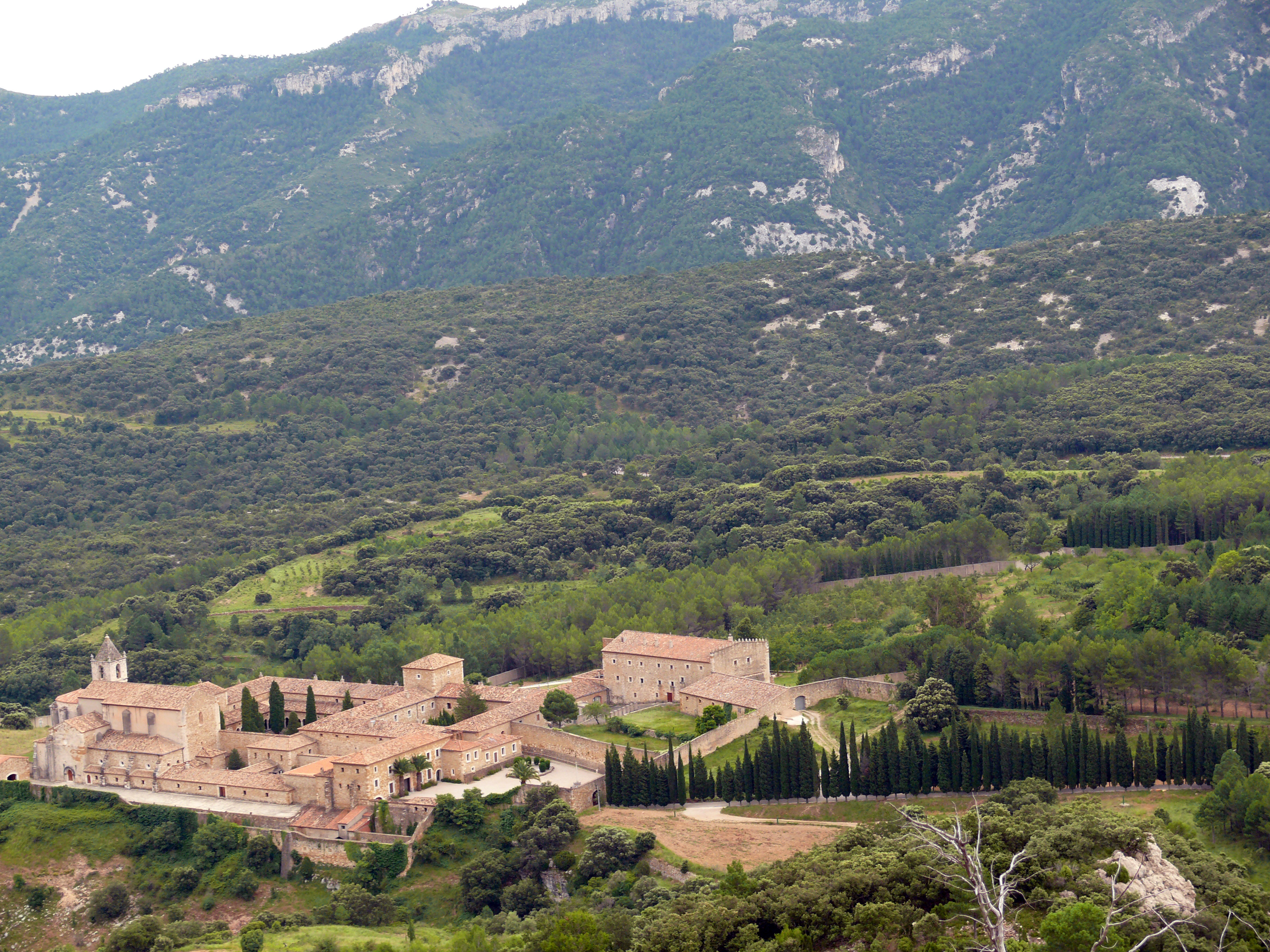 Monestir de Santa Maria (la Pobla de Benifassà)